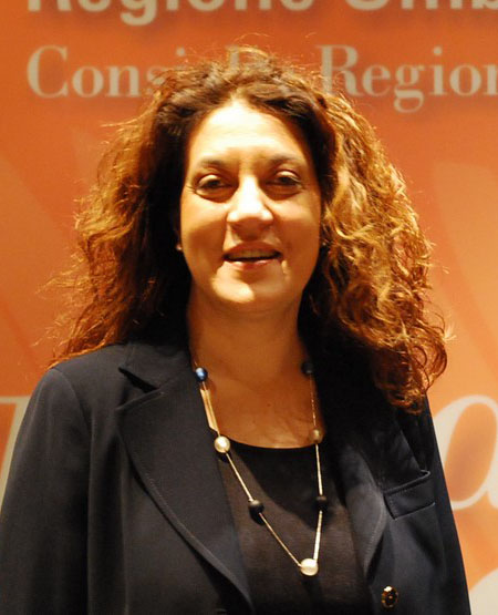 Catiuscia Marini, presidente della Regione Umbria.